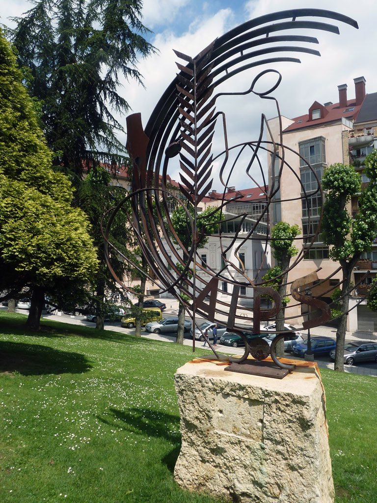 Autor.- Rafael Urrusti, 1997. El Campillín. Oviedo